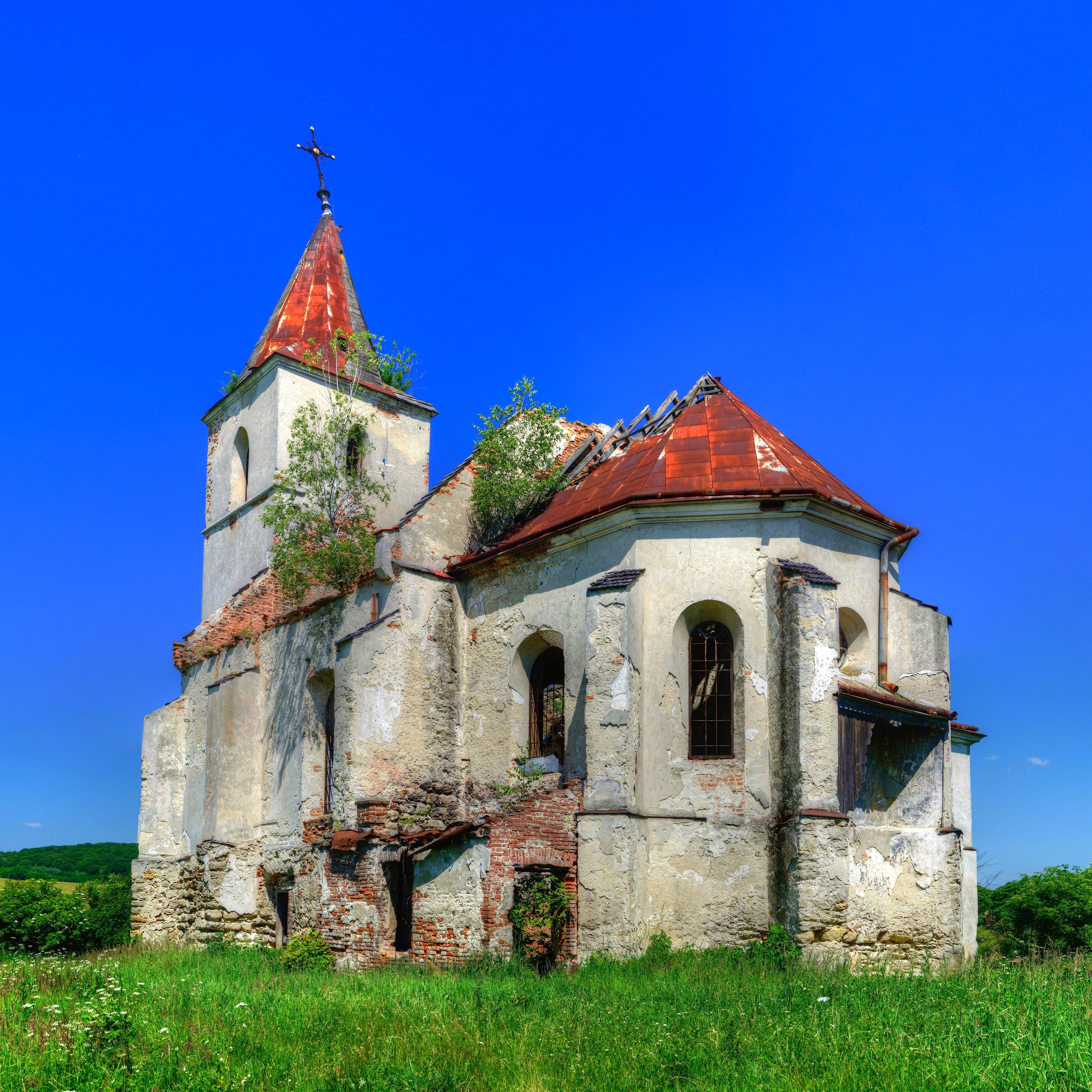 Оборонний костел в селі Соколівка Жидачівського району